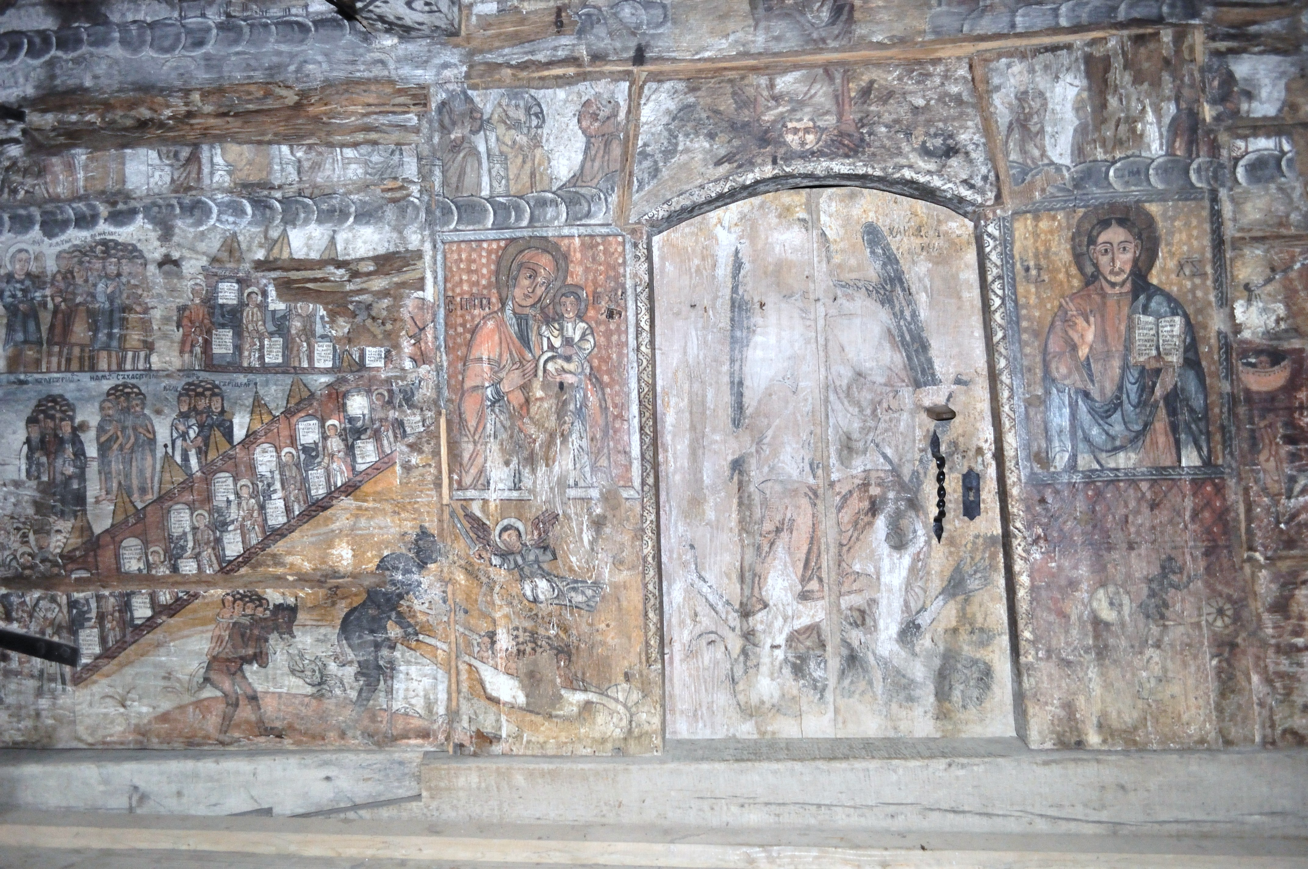 Biserica de lemn „Nașterea Maicii Domnului” din Călinești-Căeni, județul Maramureș